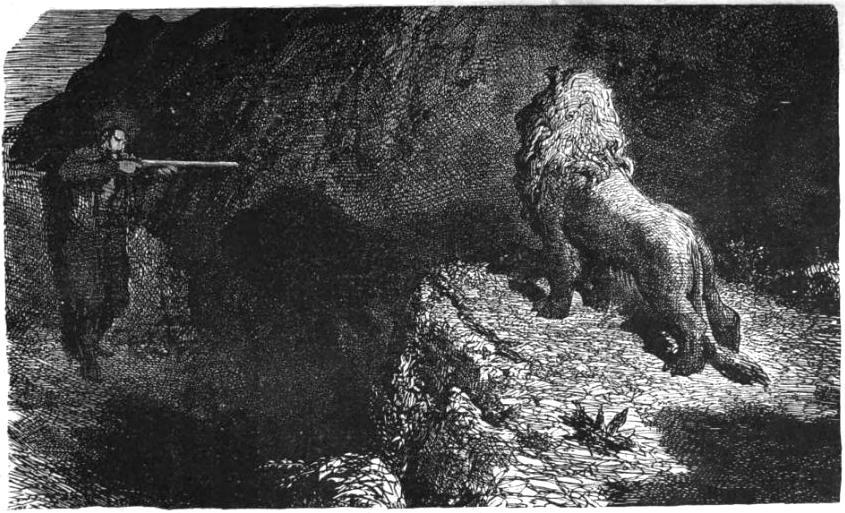 "De deux choses l'une : ou le lion était tué instantanément, ou ..."